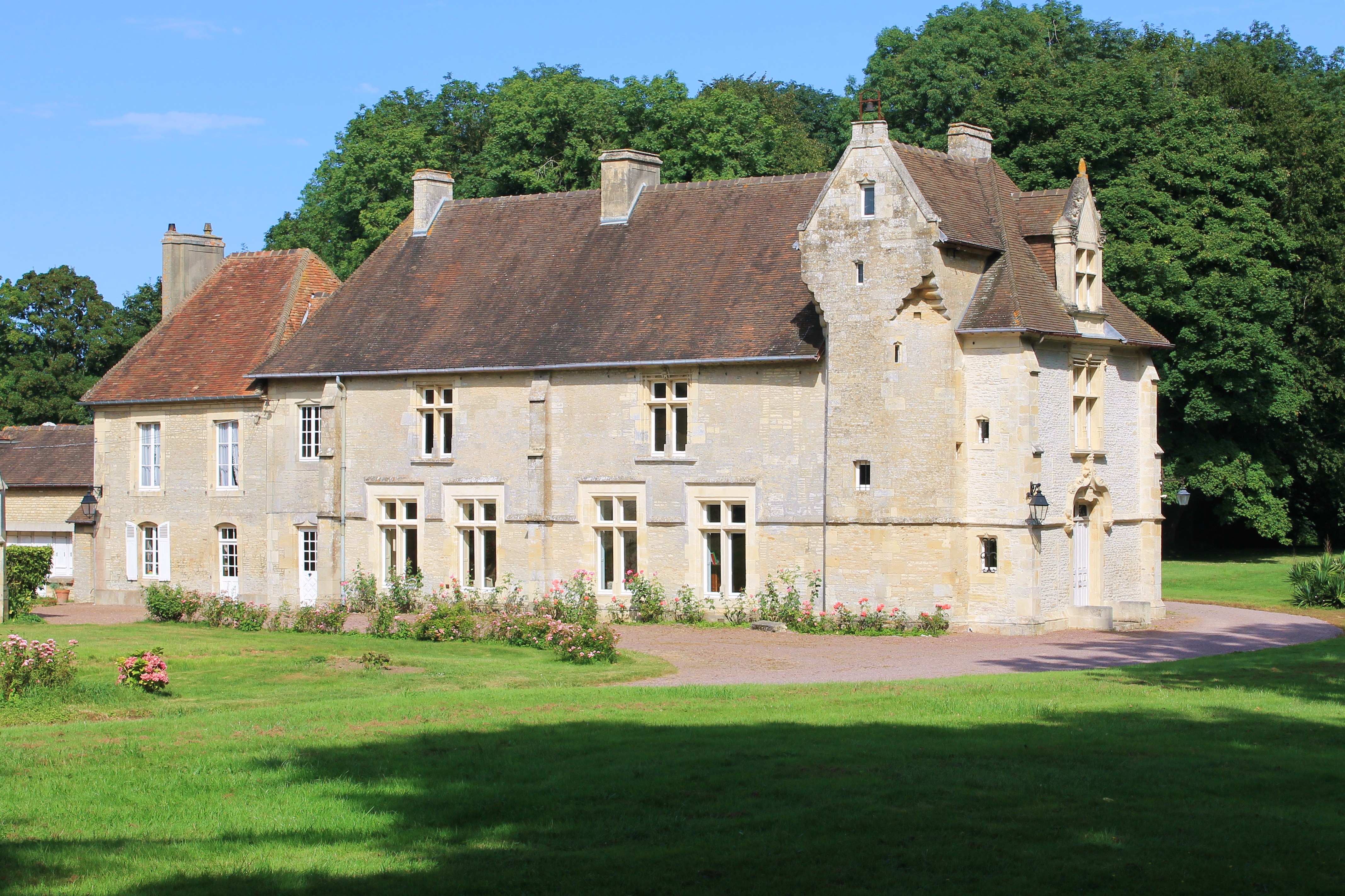 Manoir de Venoix (17ème) à Bavent (Calvados)